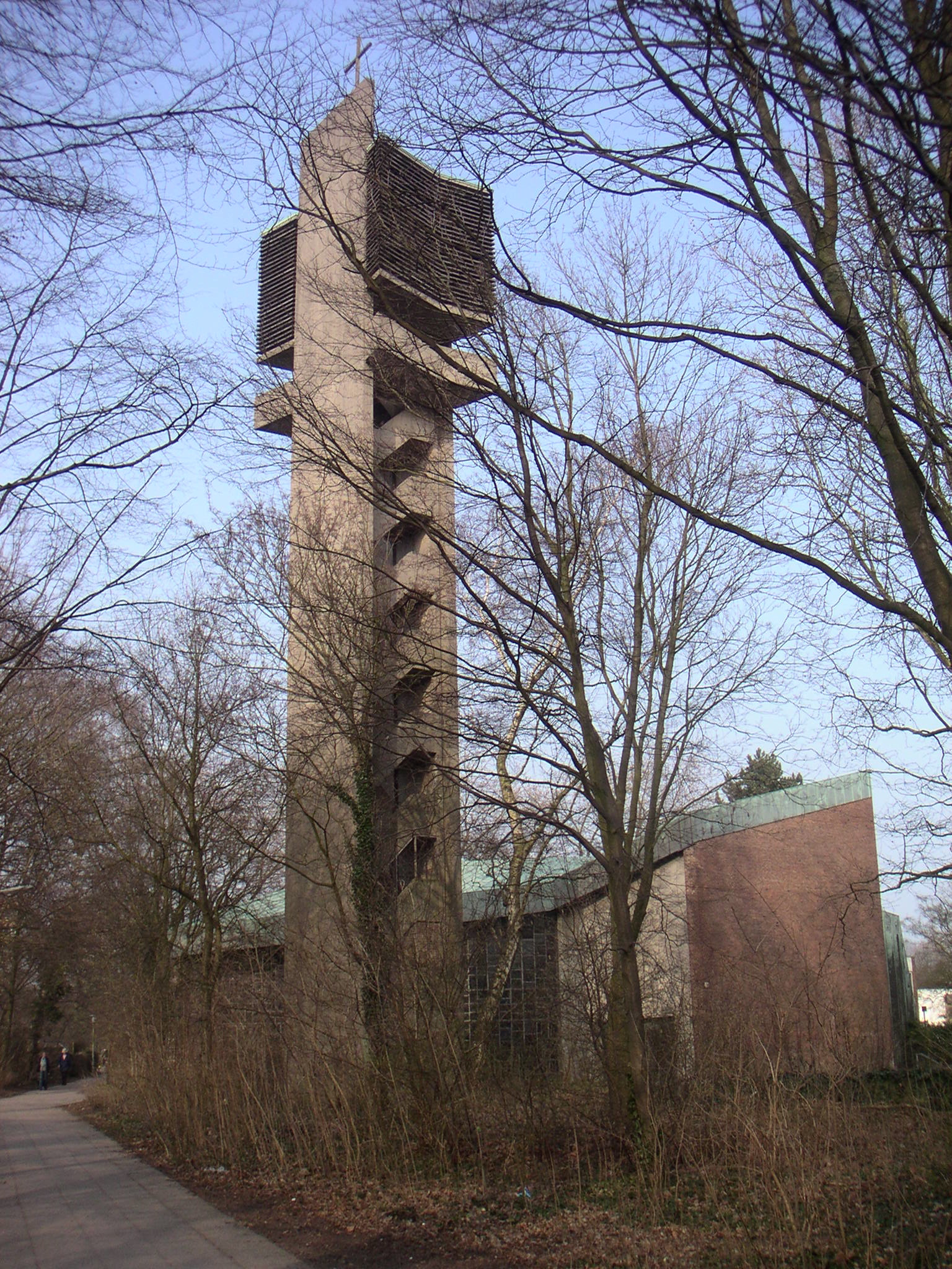 Hamburg, Lokstedt, Petruskirche, Gesamtansicht. Architekt Gert Pempelfort